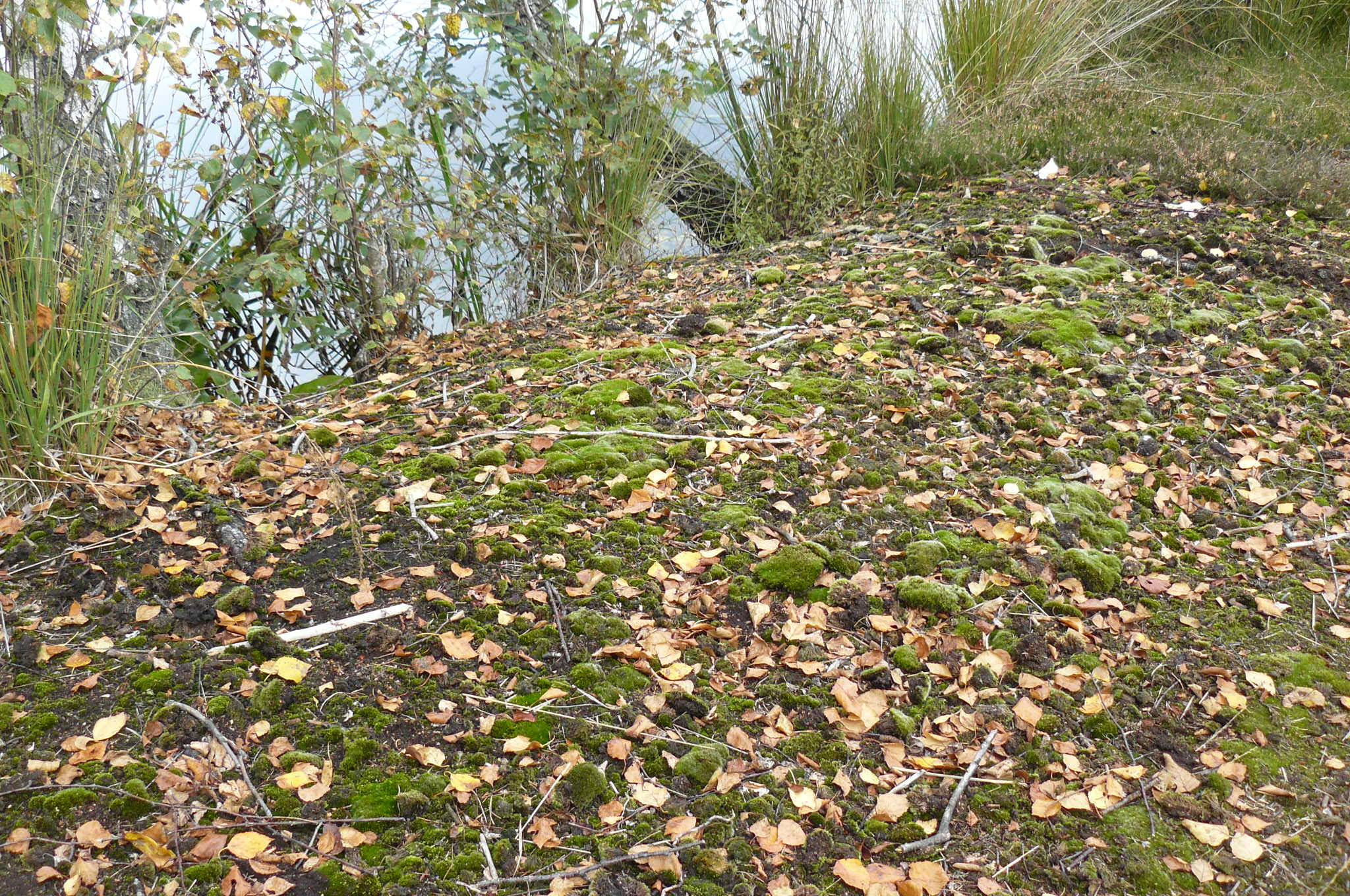 Bagno Chlebowo - torfowisko (torfianki). Gm. Ryczywół.